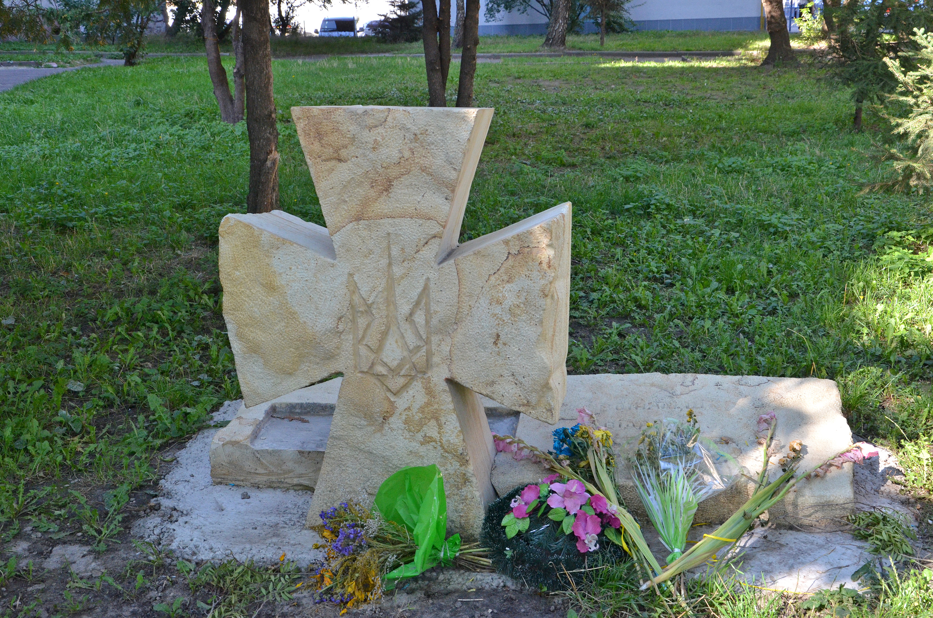 Пам'ятний знак «Воїнам, що віддали своє життя за Україну» у Сквері Волонтерів пам'яті Віктора Гурняка в Тернополі.